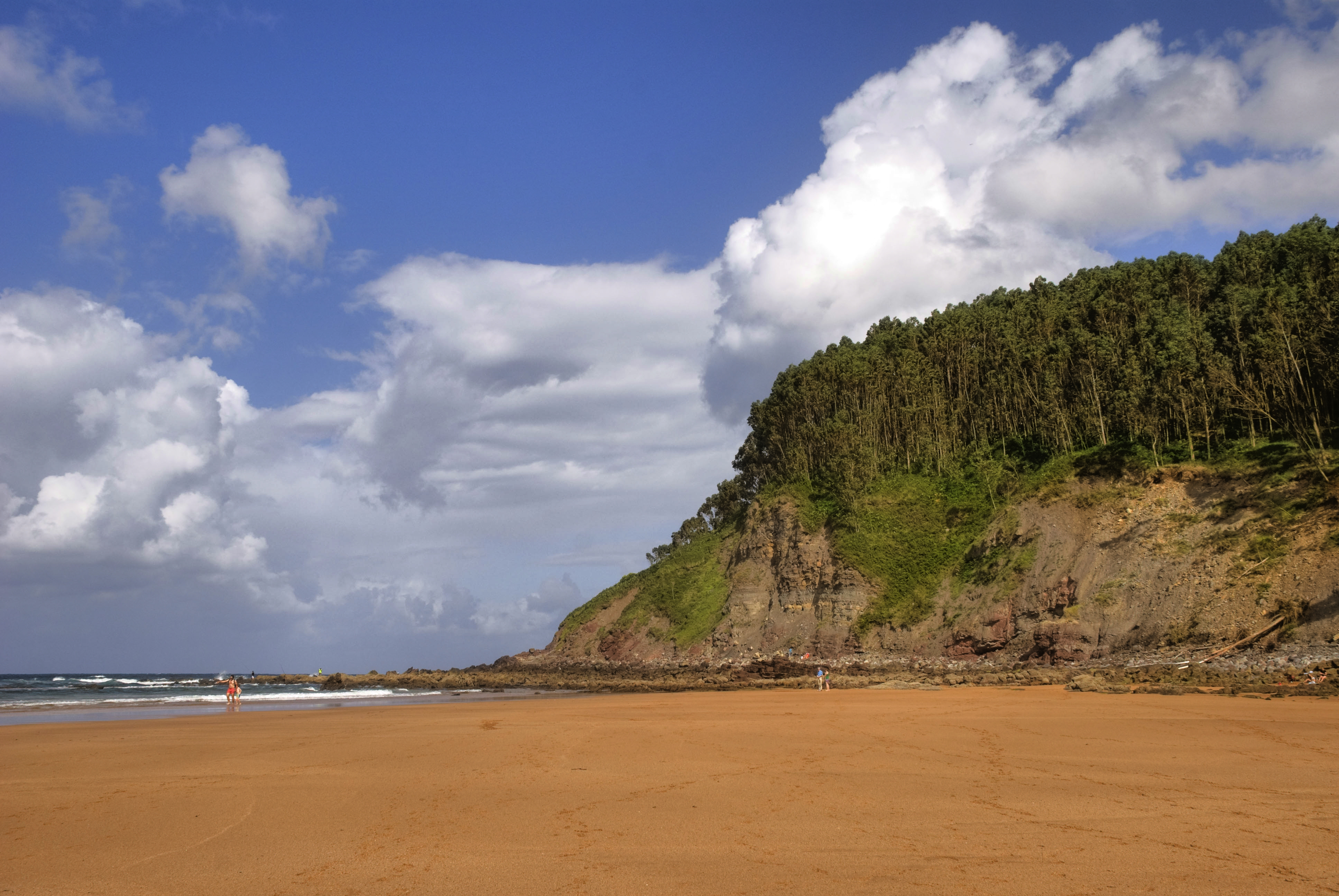 Acantilados La Griega